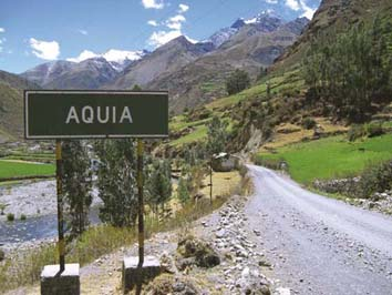 Camino a Aquia, entrada principal al distrito de Aquia